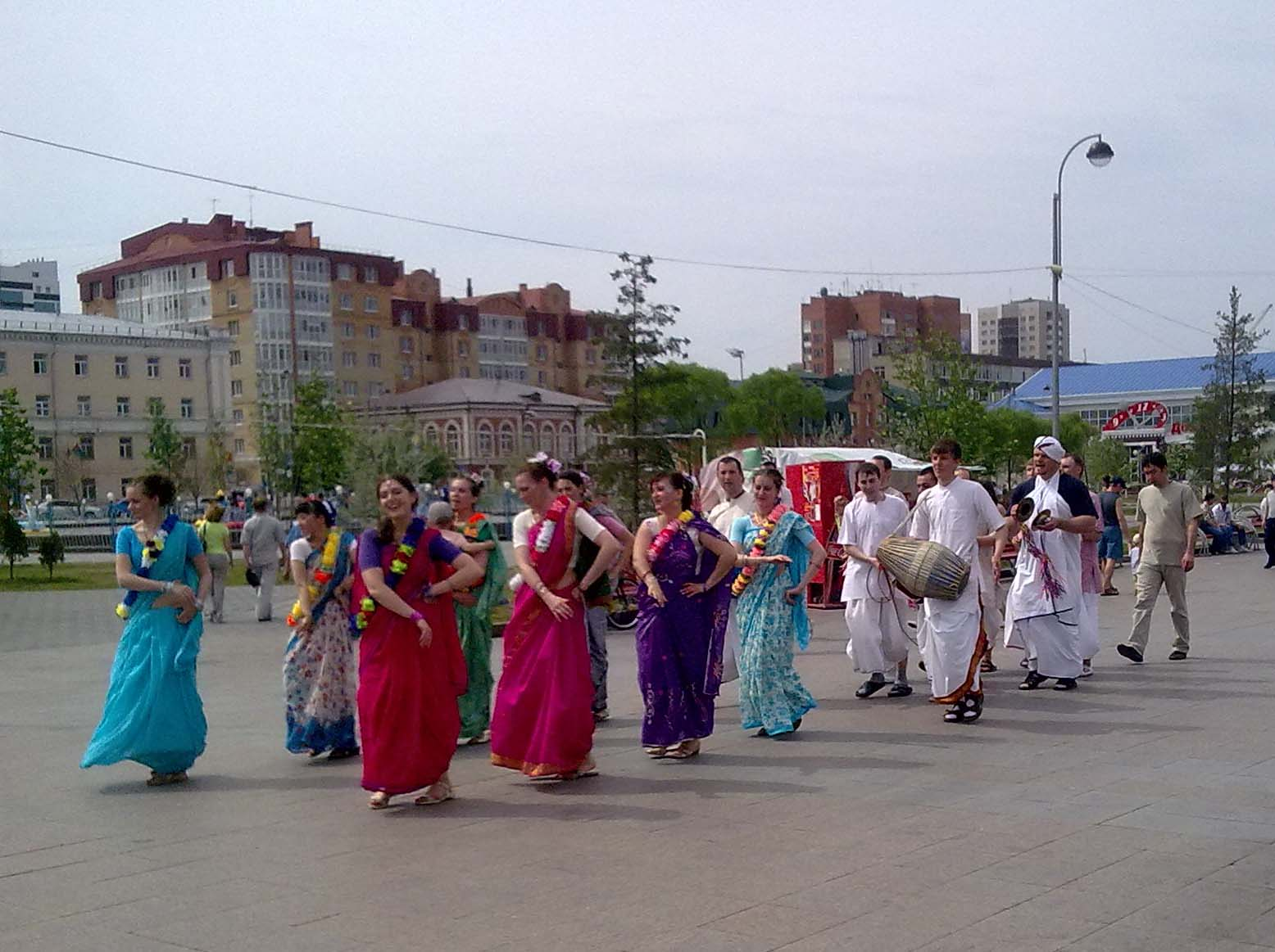 Vajŝnavoj sur Kolora bulvardo. Tjumeno, Rusio.